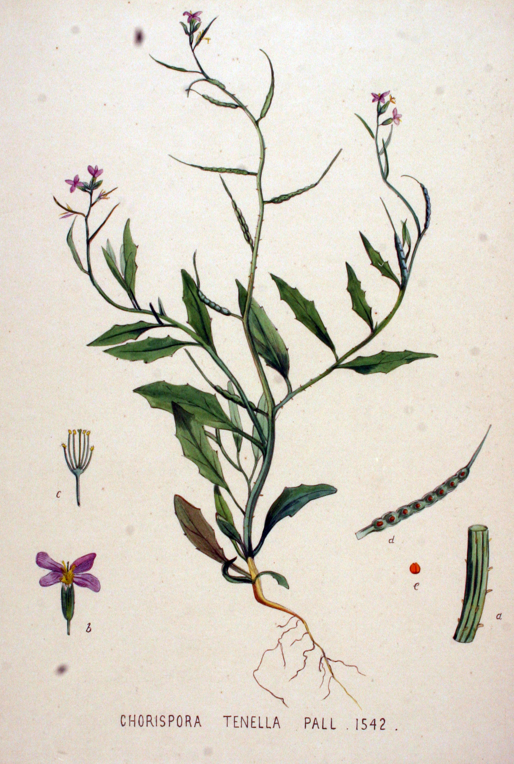 Chorispora tenella (Pallas) DC.